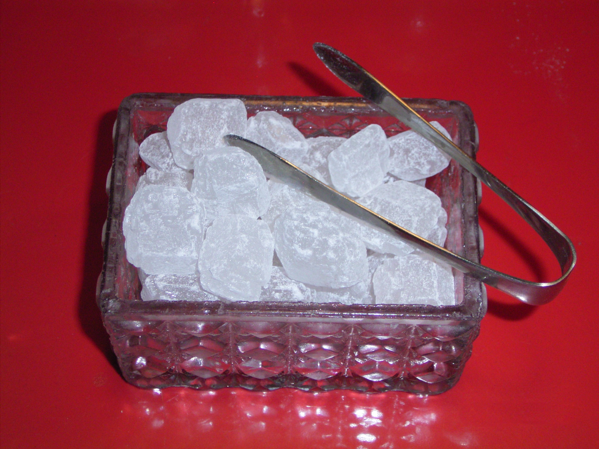 Kluntjekandis